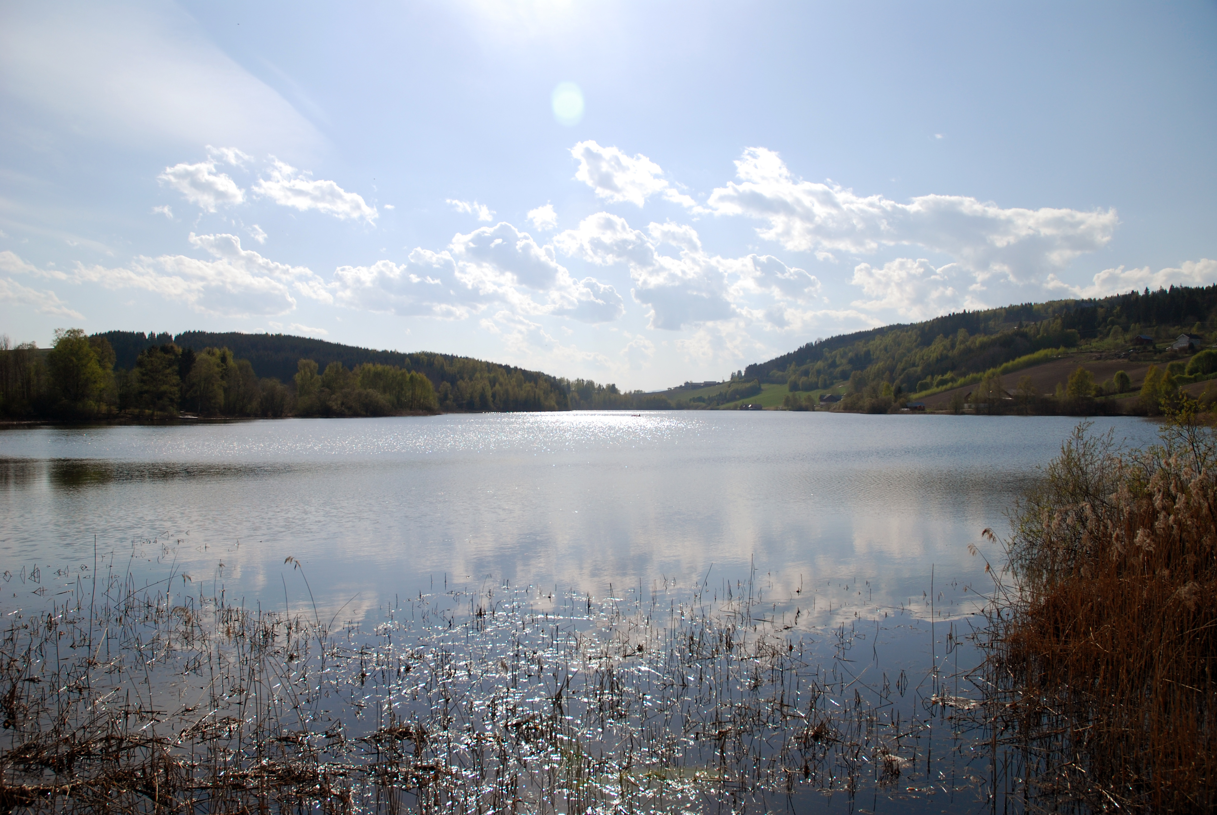 Stavsjøen, in Ringsaker, Hedmark, Norway.